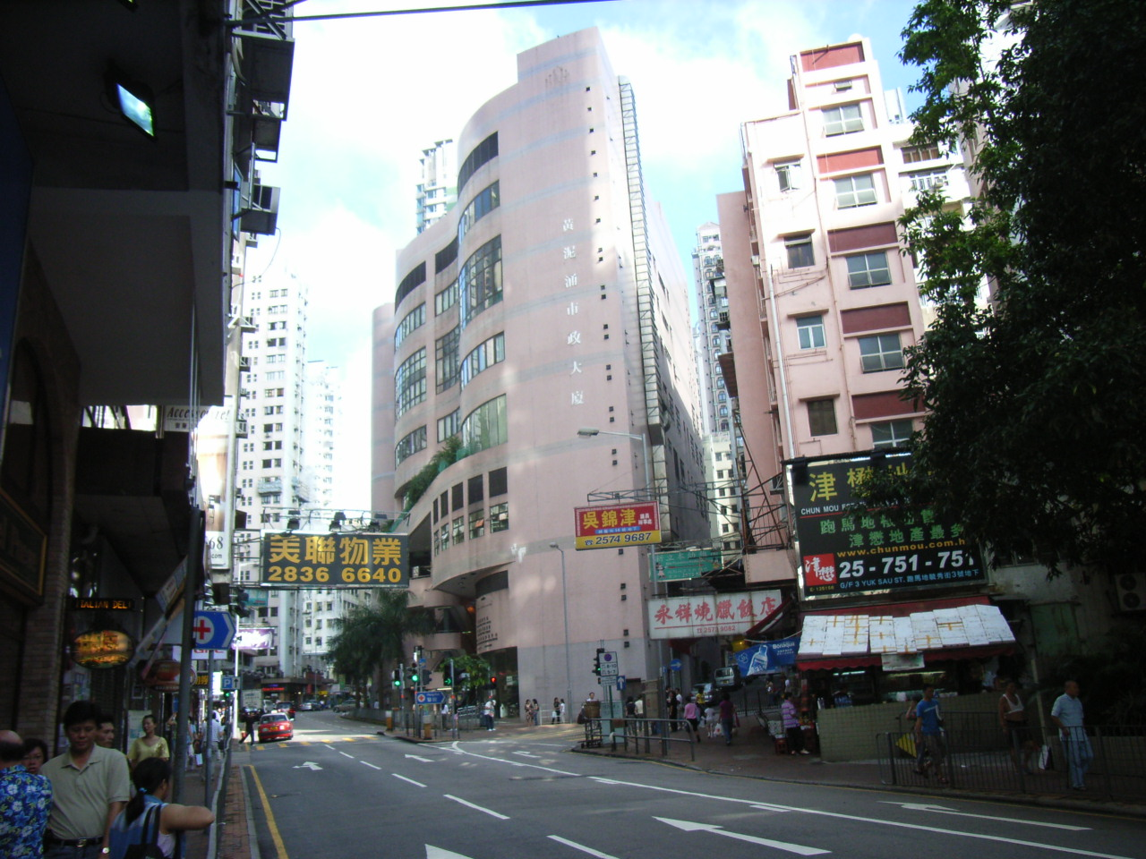 跑馬地黃泥涌市政大廈 在香港跑馬地毓秀街2號 Author: BEVERLYSHEN